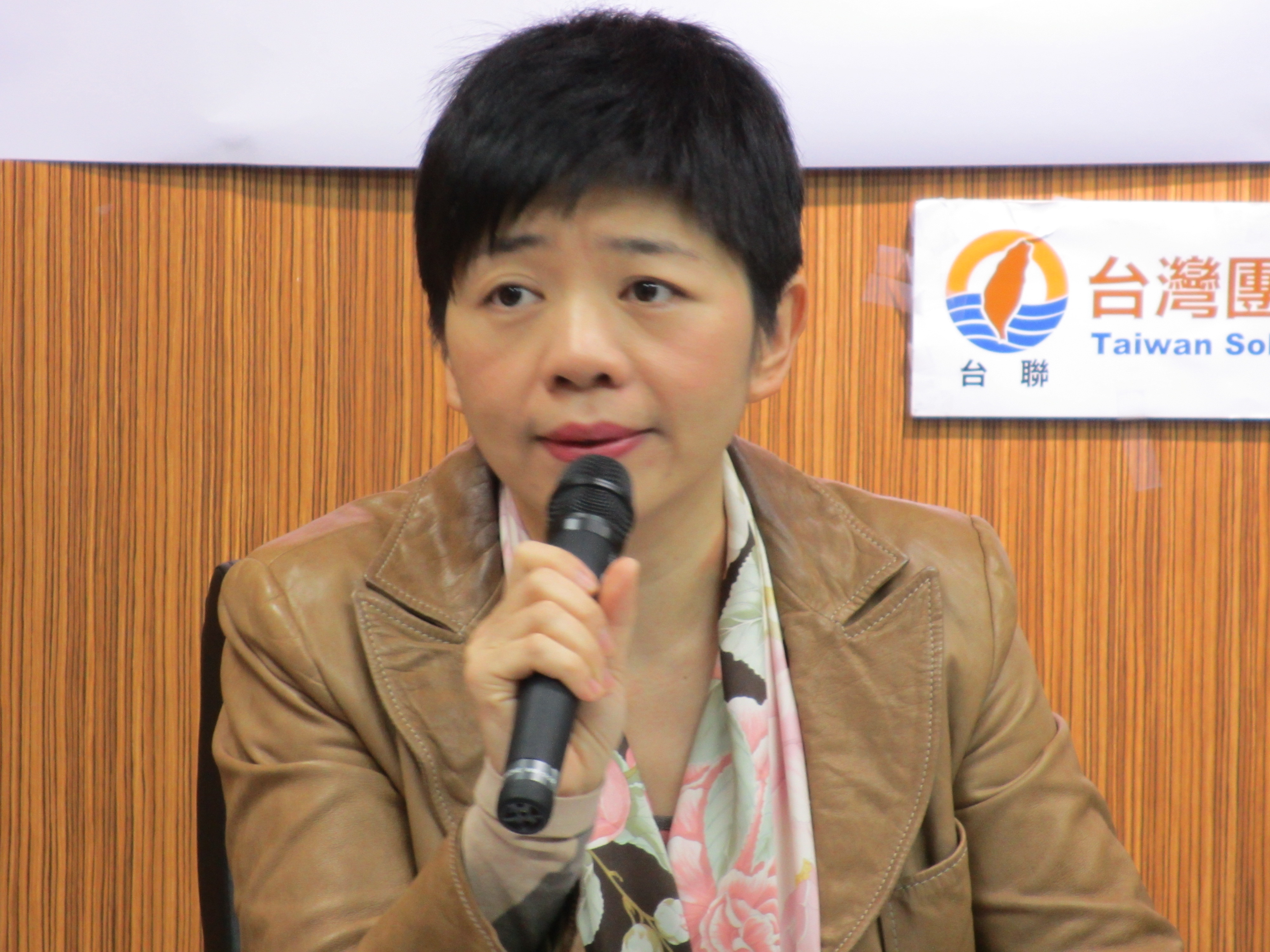 在野的臺聯黨立委林世嘉。